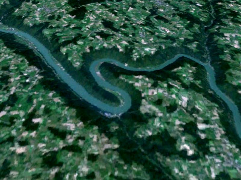 Schlögener Schlinge